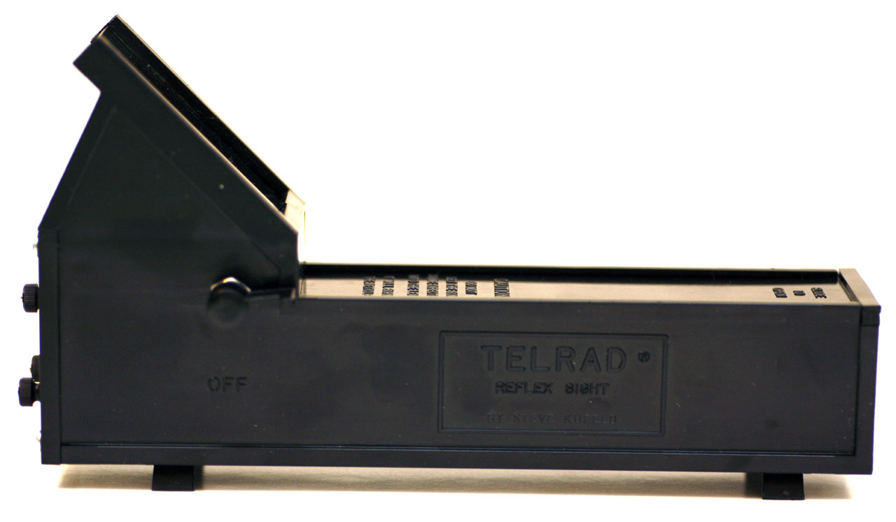 Der Telradsucher von der Seite gesehen. Kapege.de 15:22, 18 December 2006 (UTC)